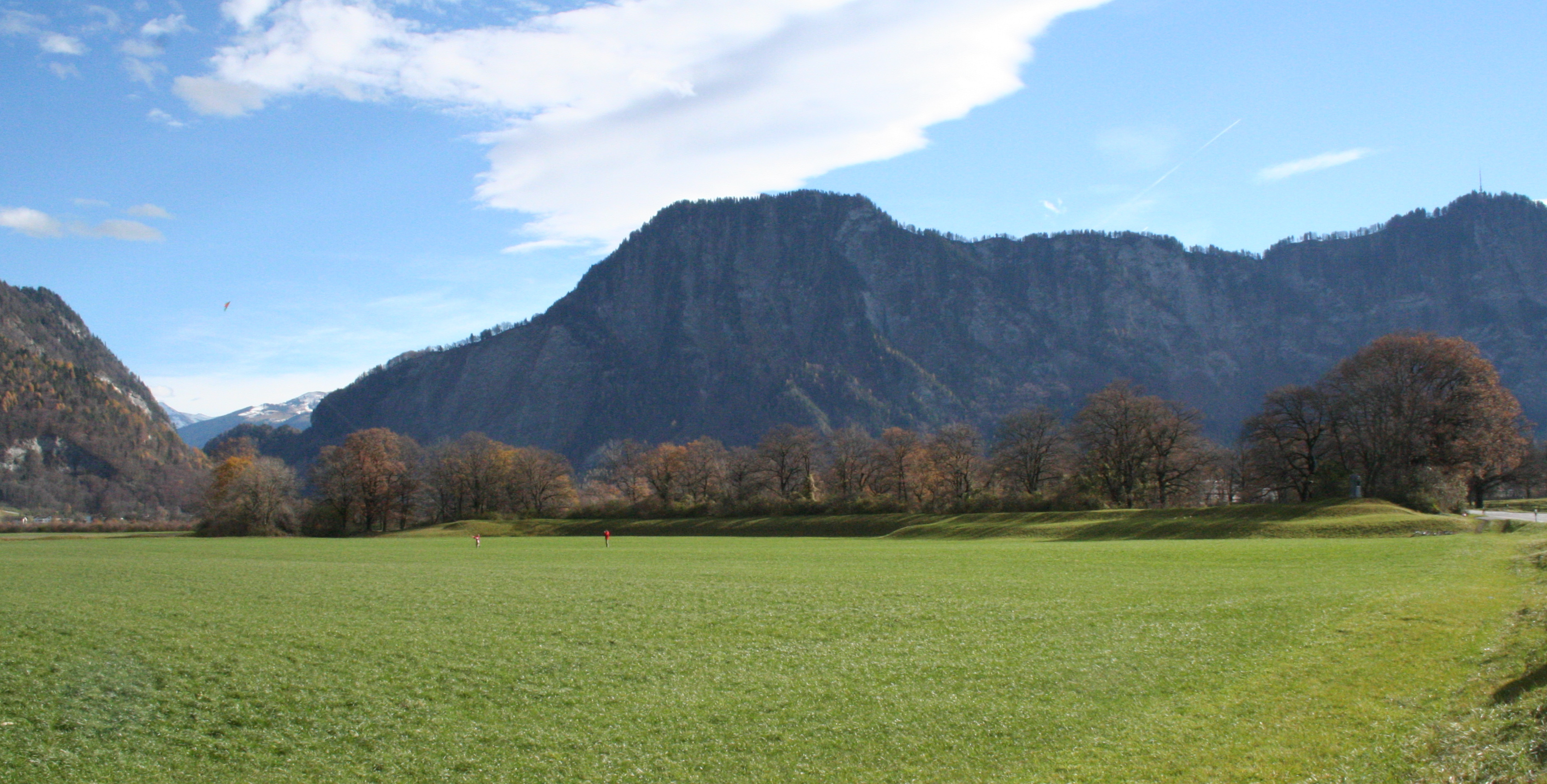 Rohanschanze bei Landquart Nordseite